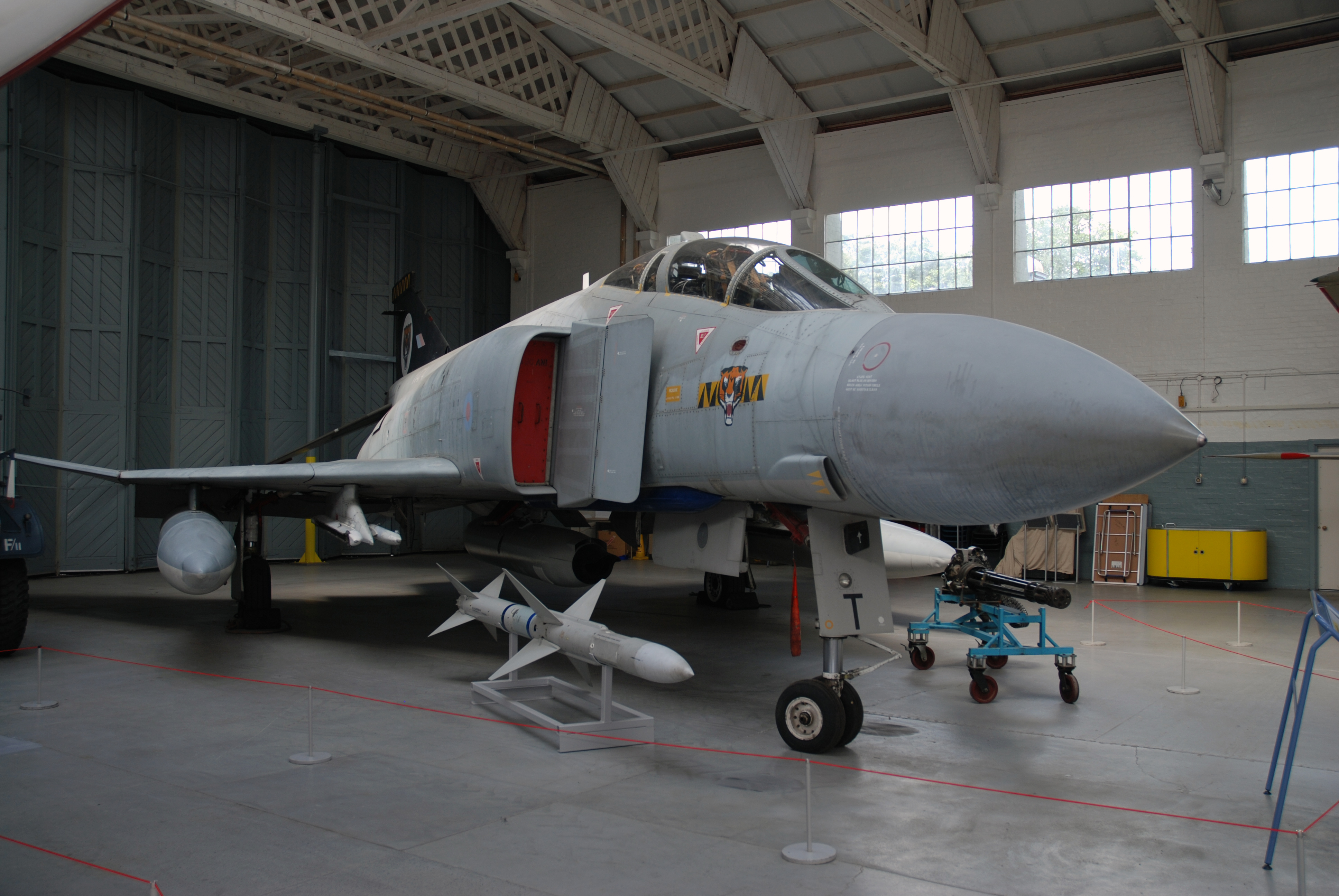 Duxford,Aug 2009